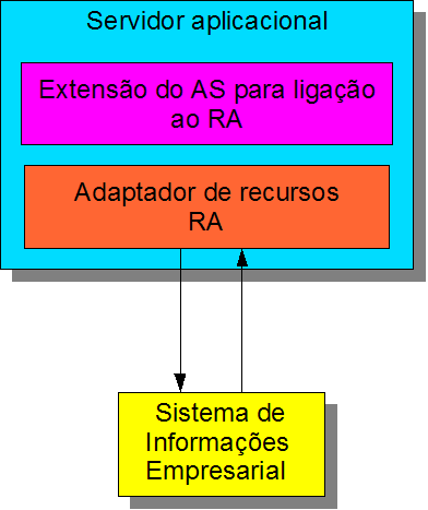 Diagrama que descreve como se liga um resource adapter de Java 2 EE a um sistema EIS. A imagem foi criada de raiz com o OpenOffice e exportada para PNG.